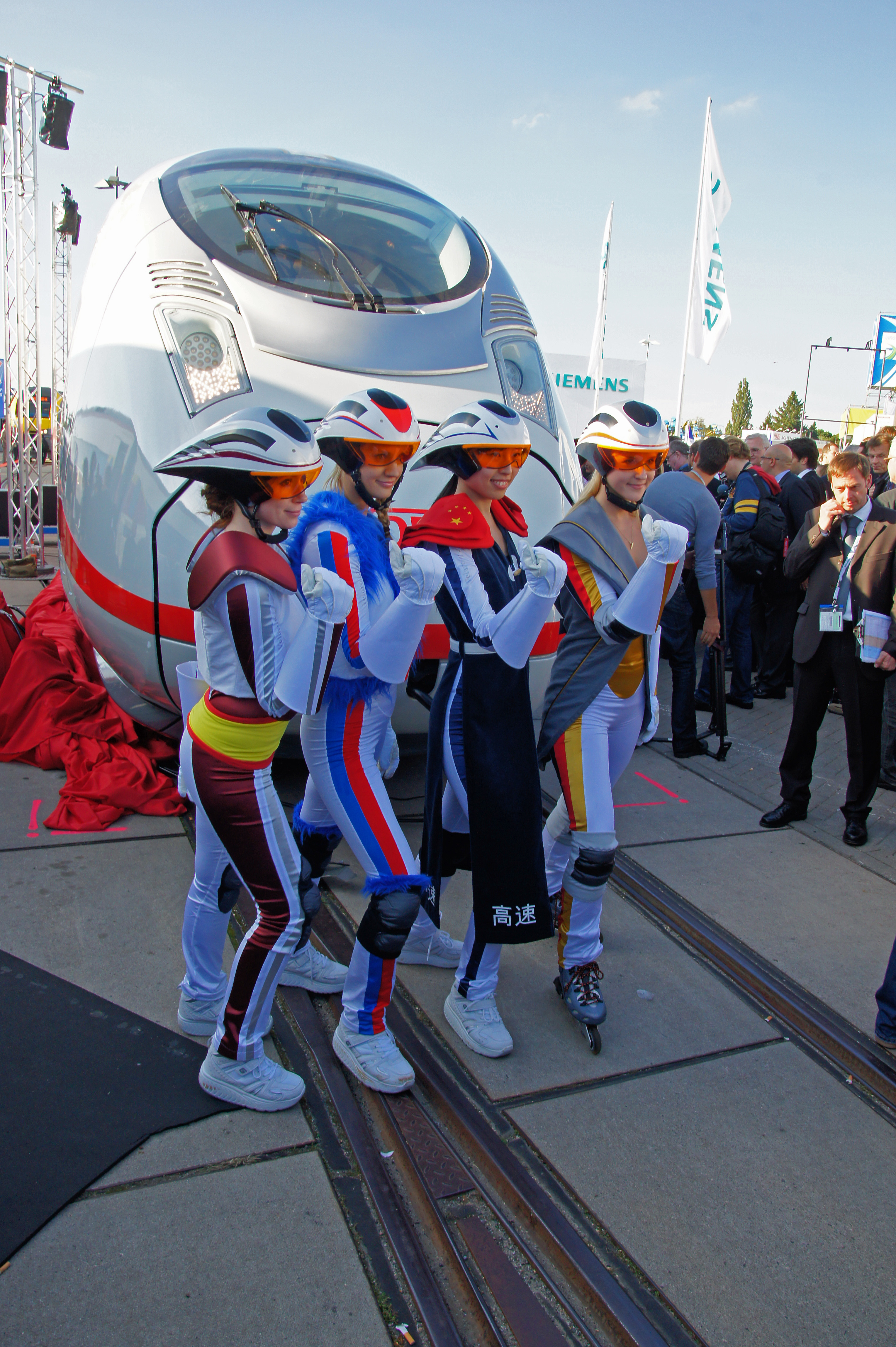 Diese 4 netten Mädels repräsentieren die Länder, in denen der Velaro schon fährt, bzw fahren wird: Spanien, Russland, China und ab Ende nächsten Jahres Deutschland.